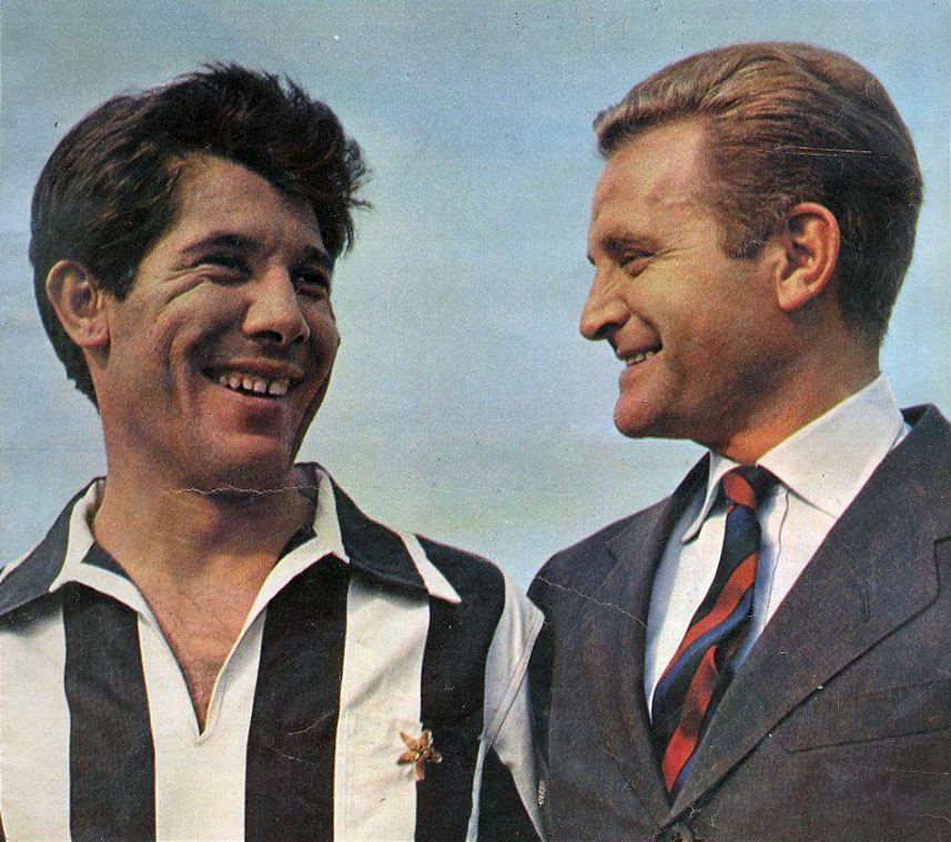 L'italo-argentino Omar Sívori (a sinistra) e l'italiano Giampiero Boniperti (a destra), rispettivamente calciatore e dirigente della Juventus nella stagione 1963-64.